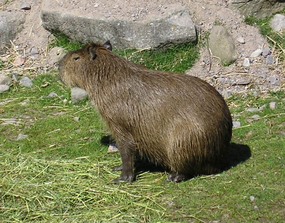 Capybara (Hydrochoerus hydrochaeris). Photographed at Kolmården zoo, Sweden.